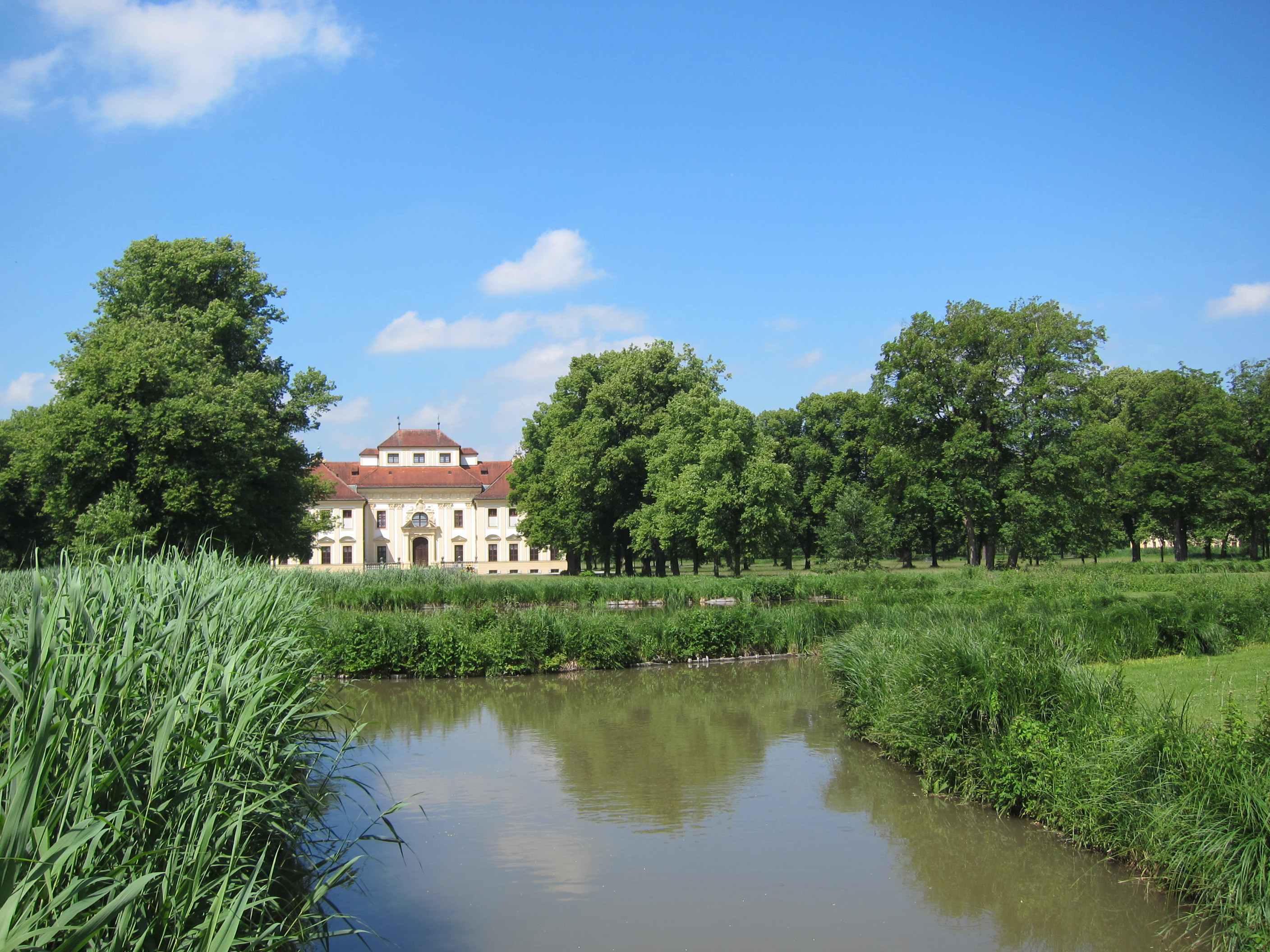 Schleißheimer Kanal, Einmündung in das Rondell von Schloss Lustheim